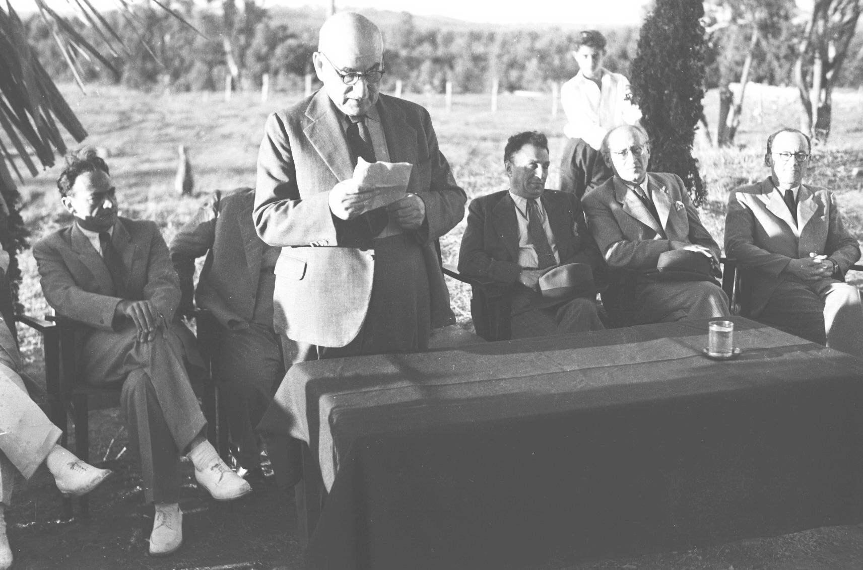 אוסף צילומים של הצלם זולטן קלוגר טווח מספרי התשלילים 25487 - 25602: הנחת אבן הפינה לבית הספר על שם שנקר